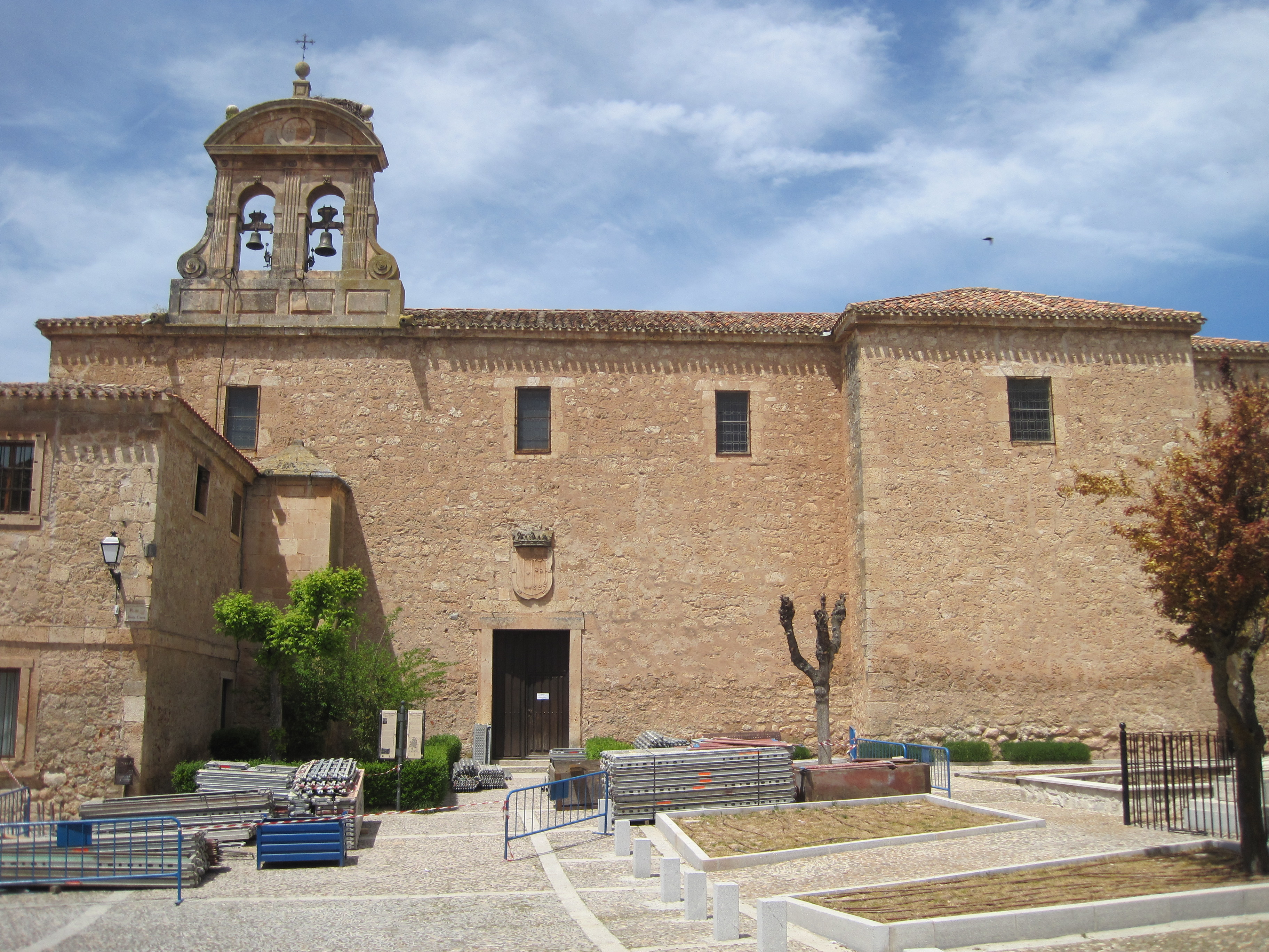 Vista externa del Convento de Santa Clara de Lerma.